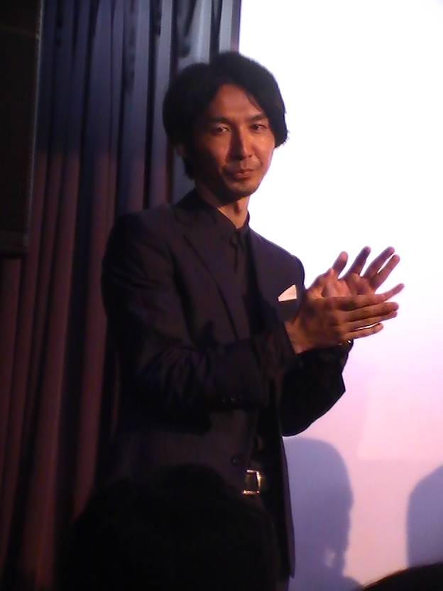 三福エンターテイメント (2017年5月22日)